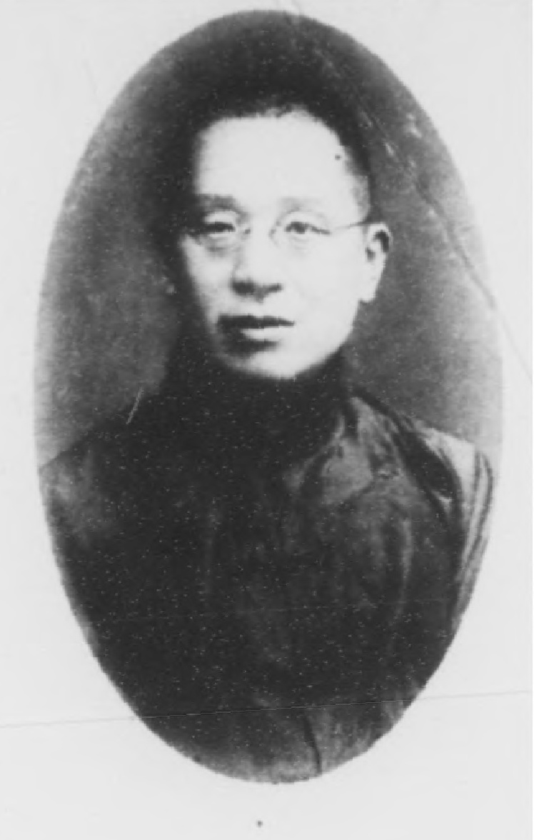 光緒甲辰科進士小像